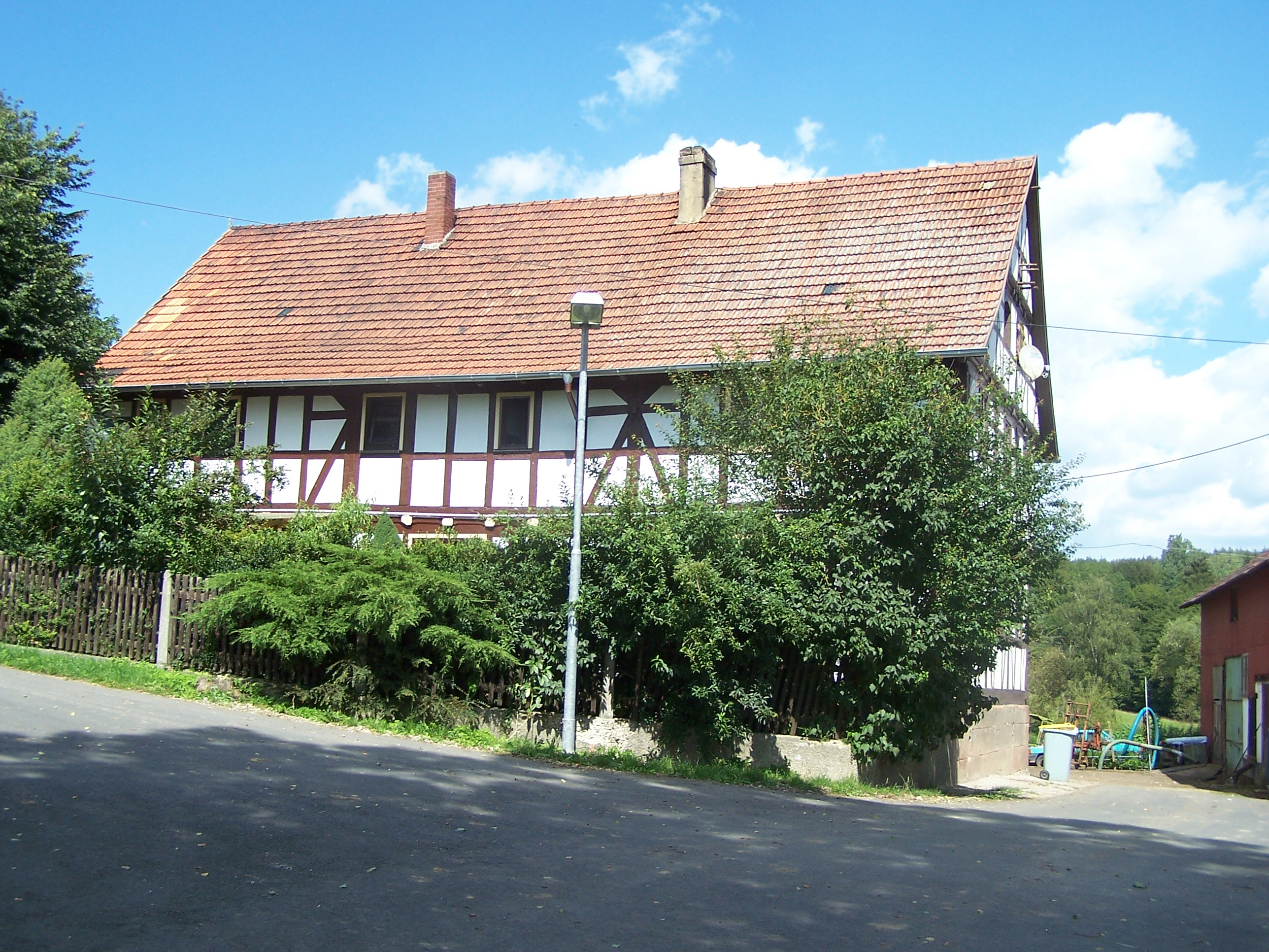 Das heute älteste Gebäude steht am oberen Kirstingshof. Laut Inschrift wurde es von Johann Capar Gerlach erbaut im Jahre 1796.